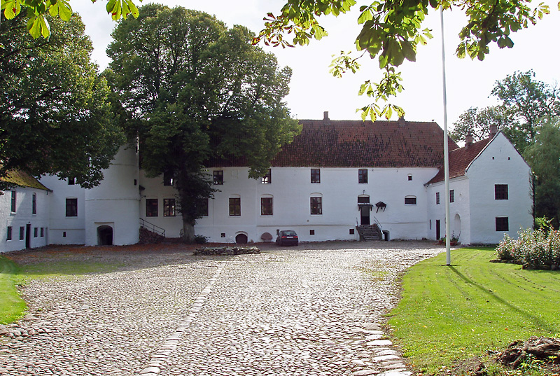 Lerkenfeldt, er en herregård ved Farsø i Himmerland, nærmere bestemt Vesterbølle Sogn, Rinds Herred, Viborg Amt, Denmark. Gårdspladsen